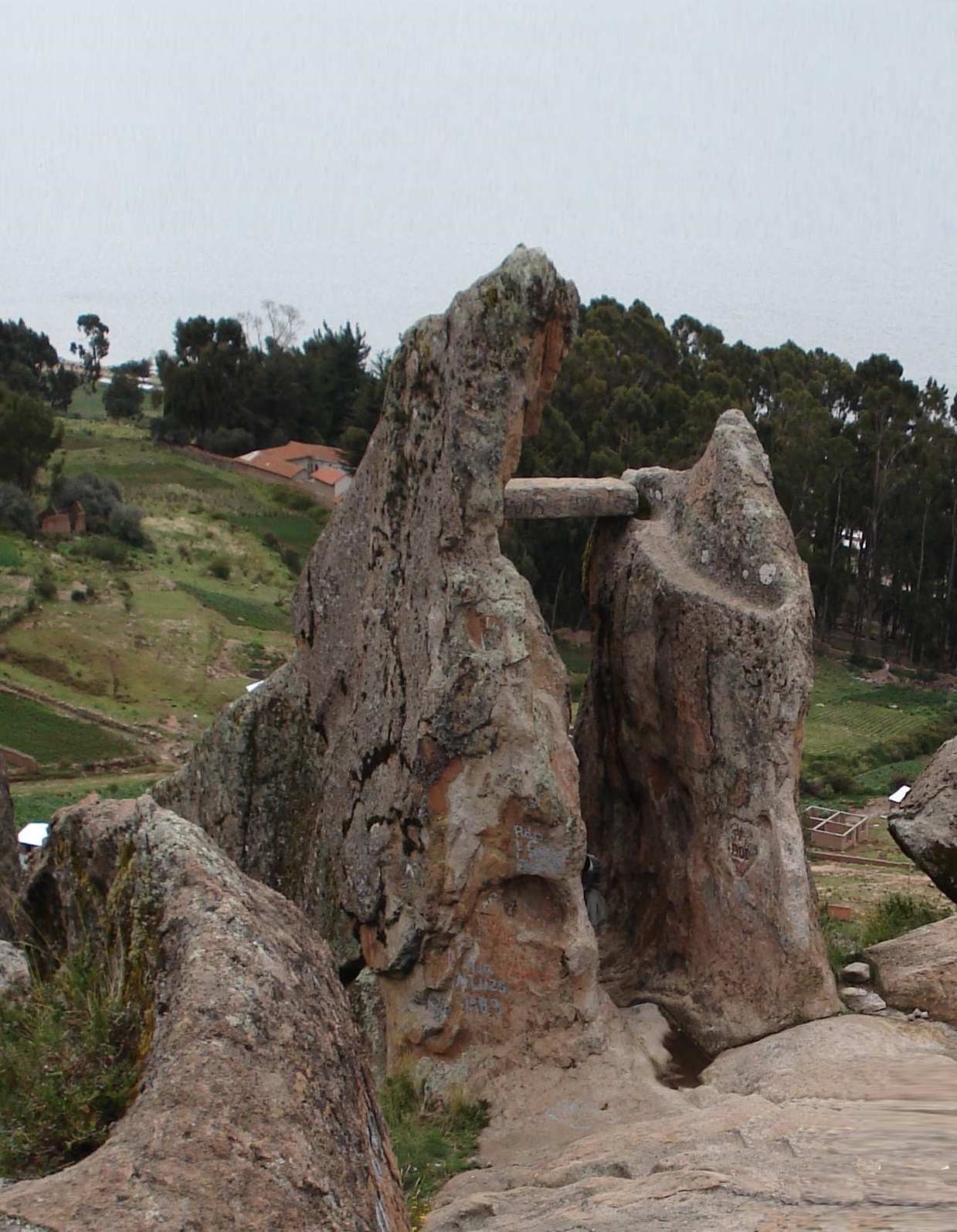 Trabajo derivado de